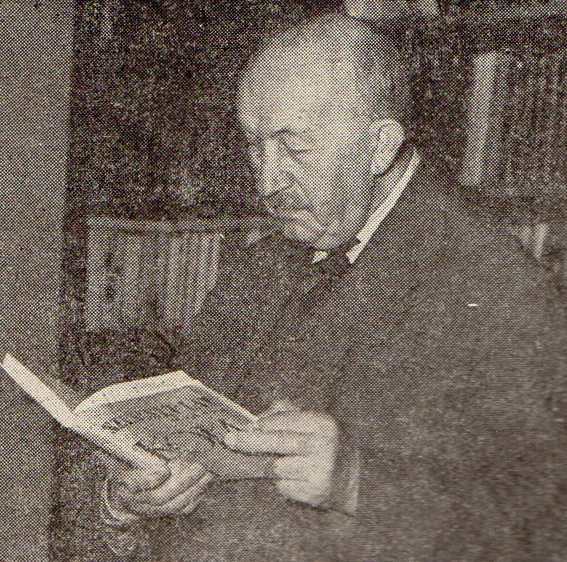 Józef Kostrzewski w 1964r.